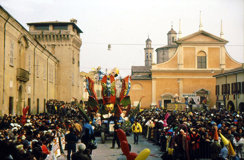 Castel Goffredo, Carnevale 1987.